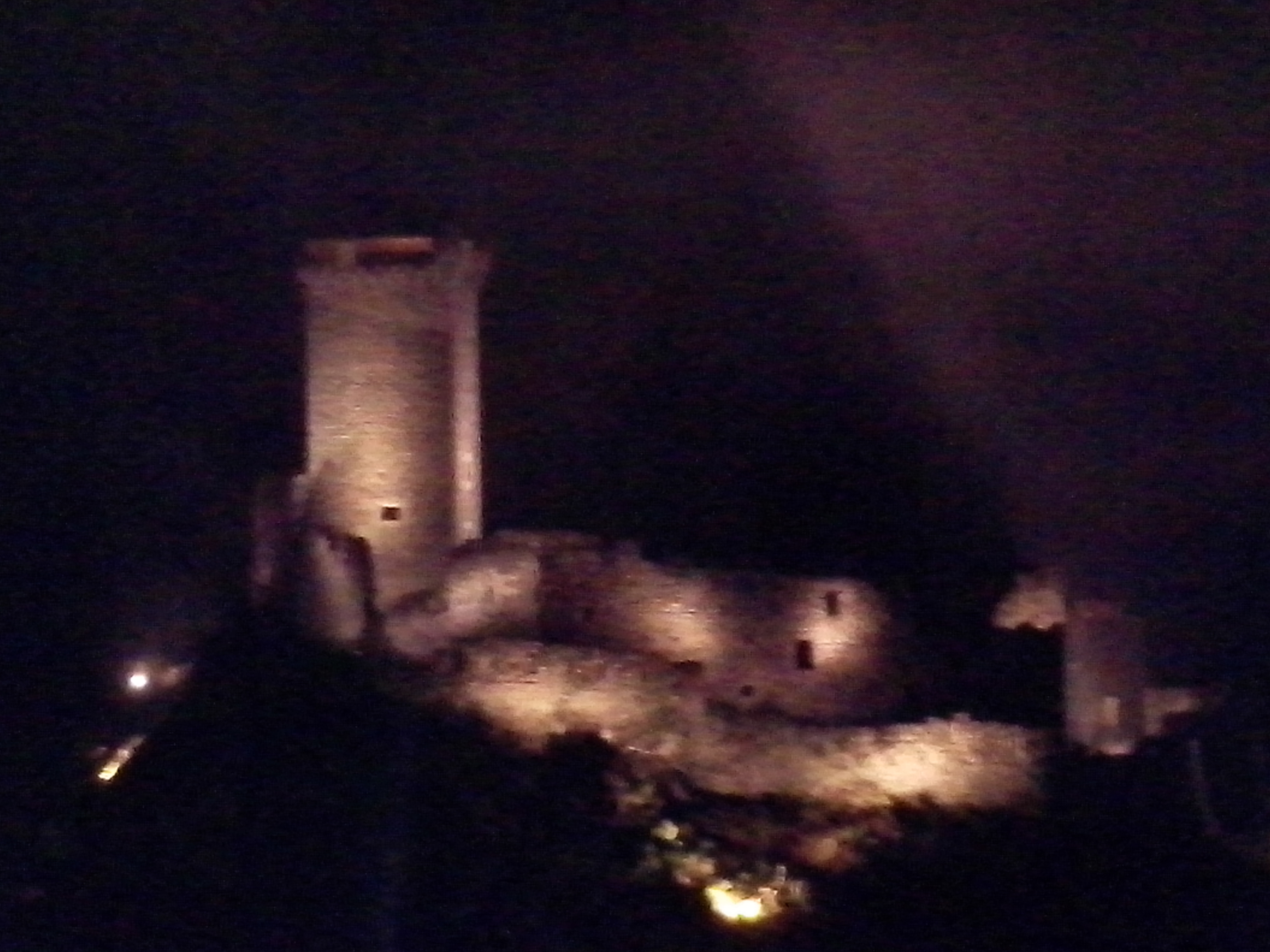 Il Castello di San Michele illuminato durante un evento estivo.